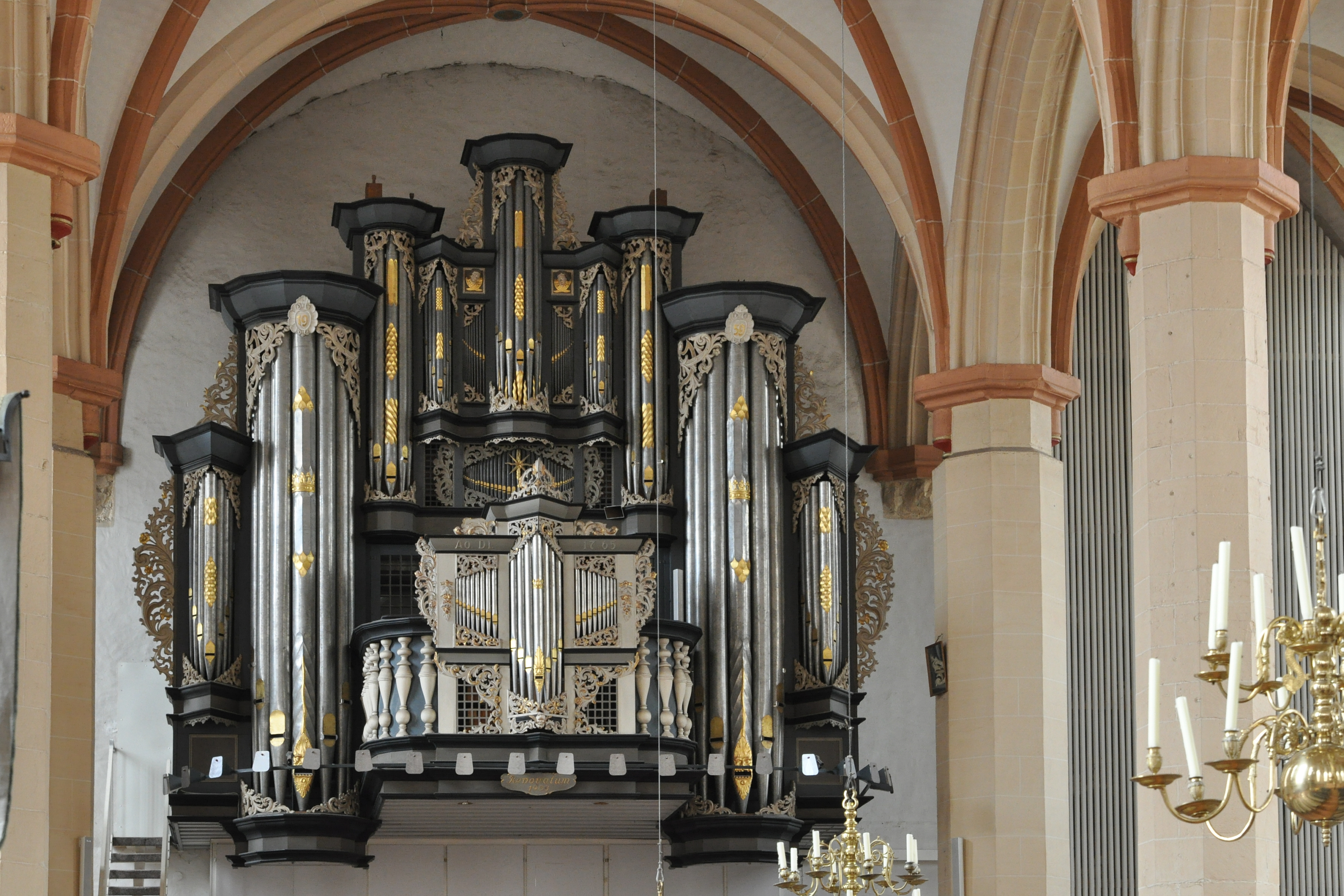 Orgel (aus dem 1754 für Wrisbergholzen und dem 1765 für die Kirche in Rautenberg gebauten Orgelwerk sowie weiteren barocken Einzelteilen zusammengefügt) von Palandt (1953-60) und Rietzsch (1992) in der St.-Lamberti-Kirche (Hildesheim).